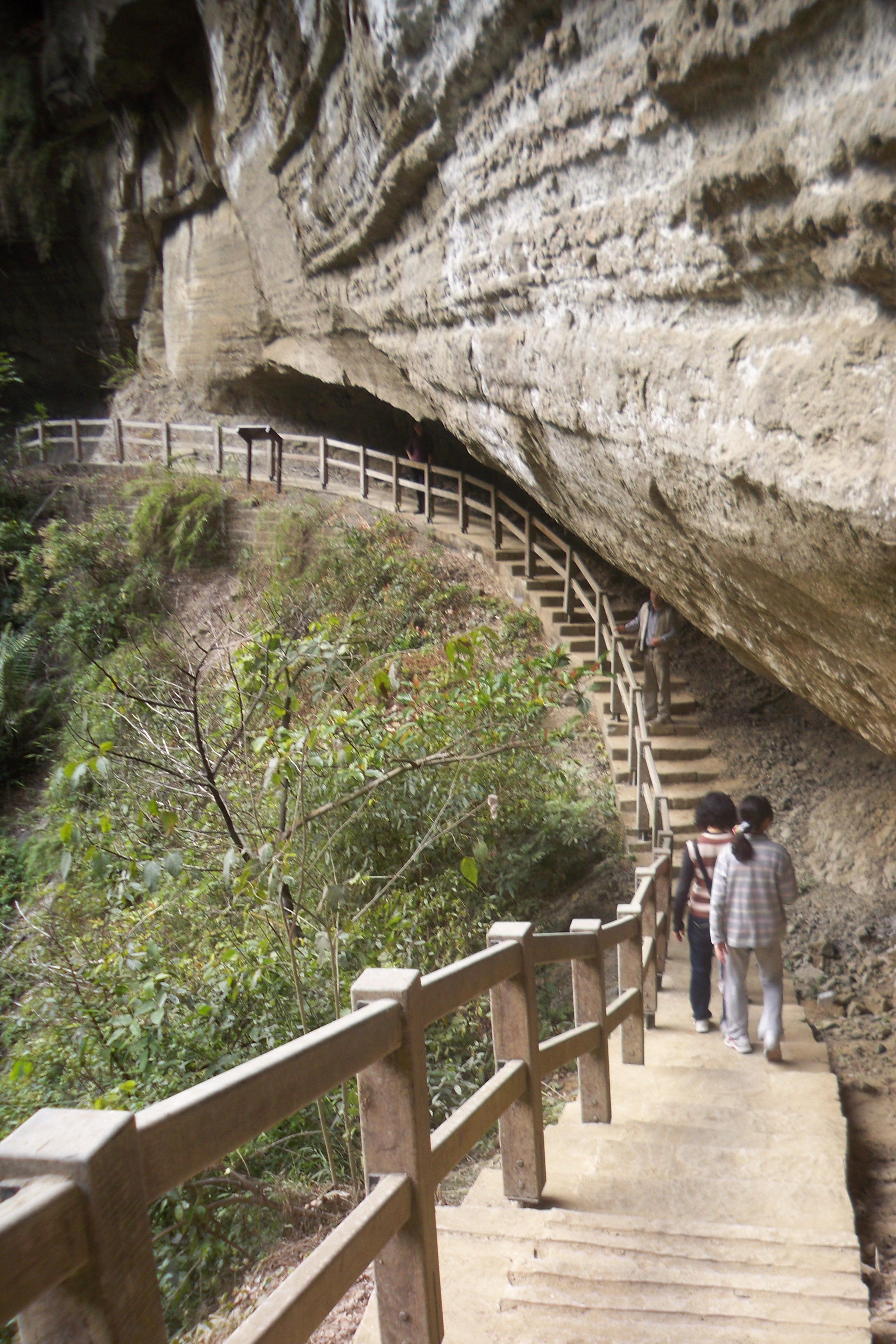 燕子崖